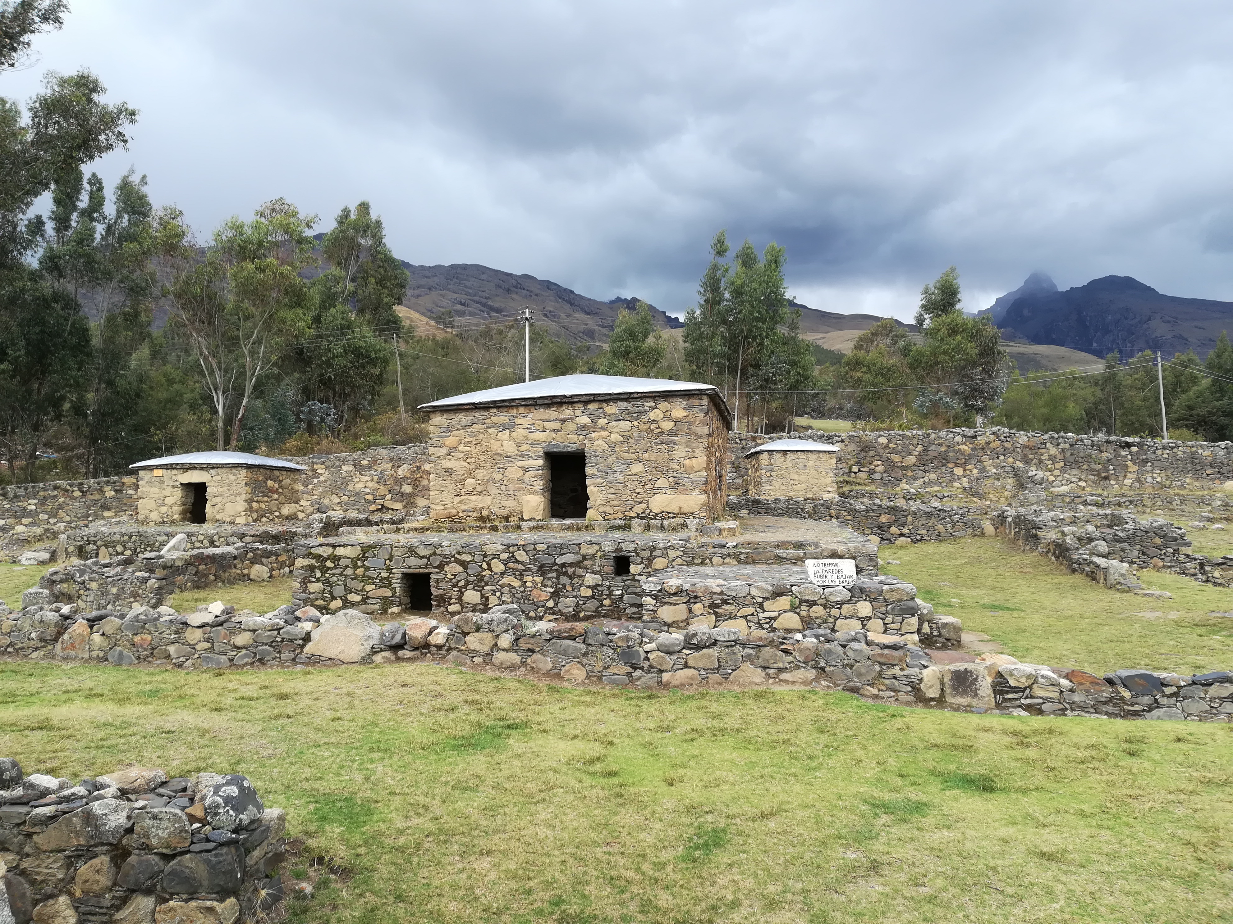 Sitio arqueológico Willcahuain, Huaraz, región Áncash, Perú.